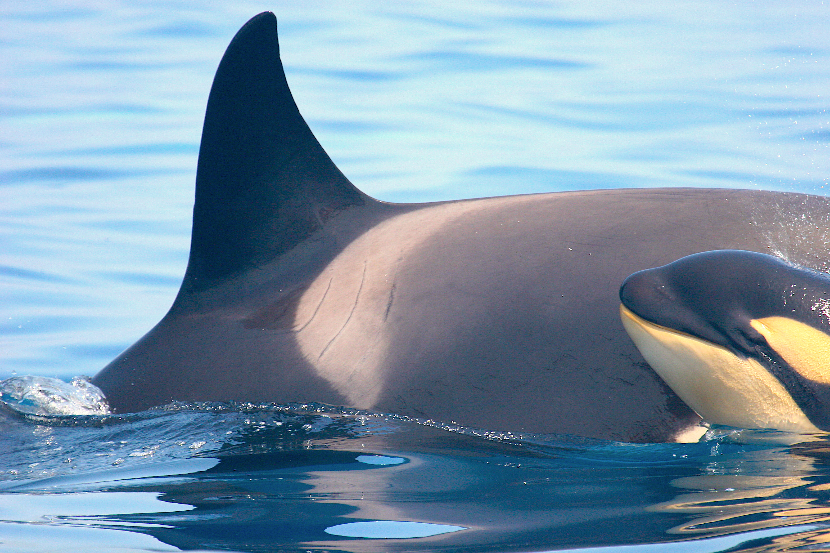 Madre hijo de orca en el Estrecho